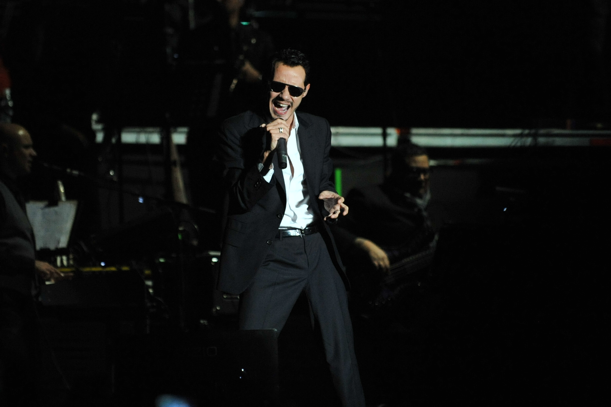 Foto gentileza de Sergio Dávalos.